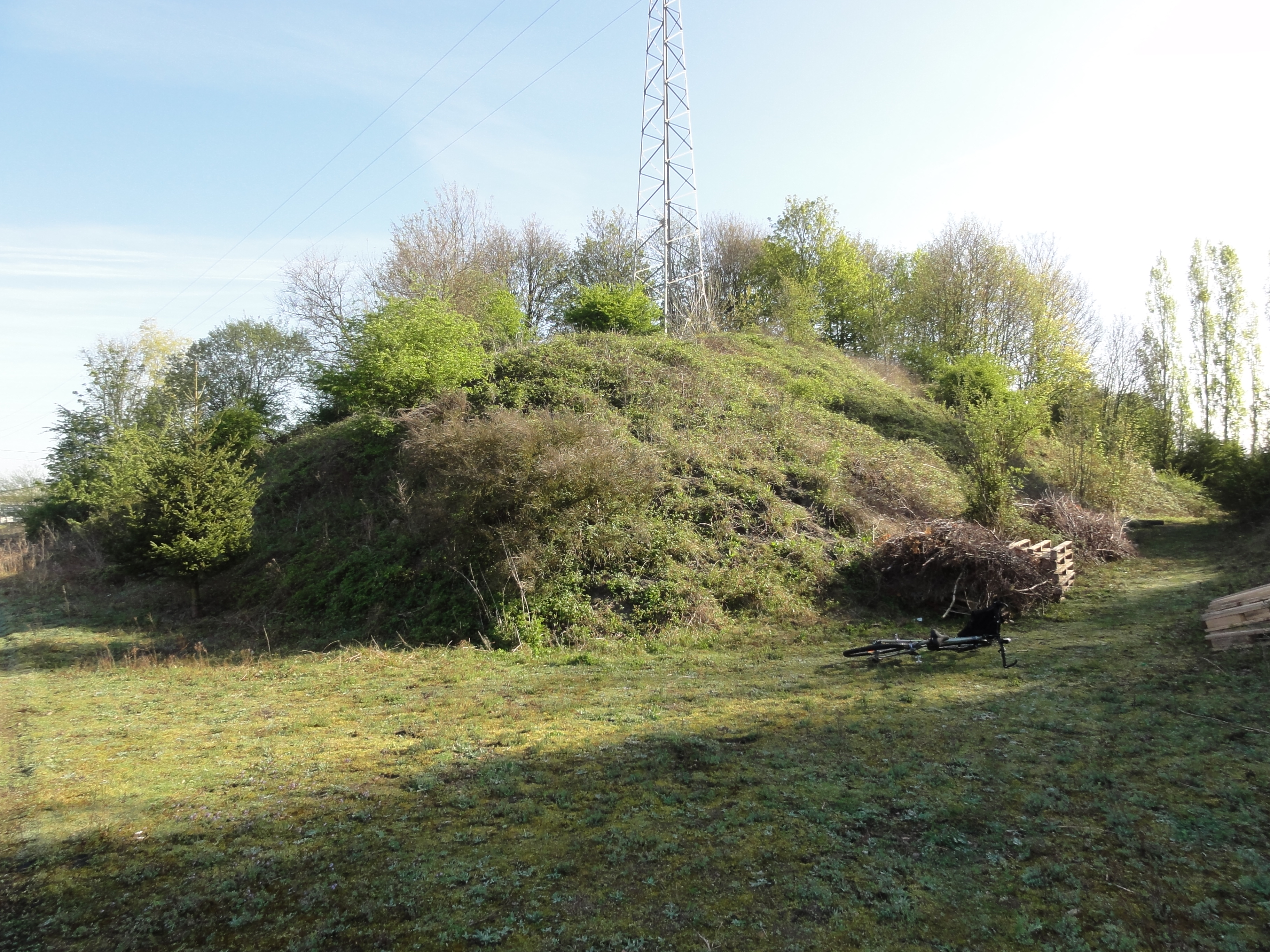 Terril n° 131 dit Fénelon, Fosse Fénelon de la Compagnie des mines d'Aniche, Aniche, Nord, Nord-Pas-de-Calais, France.